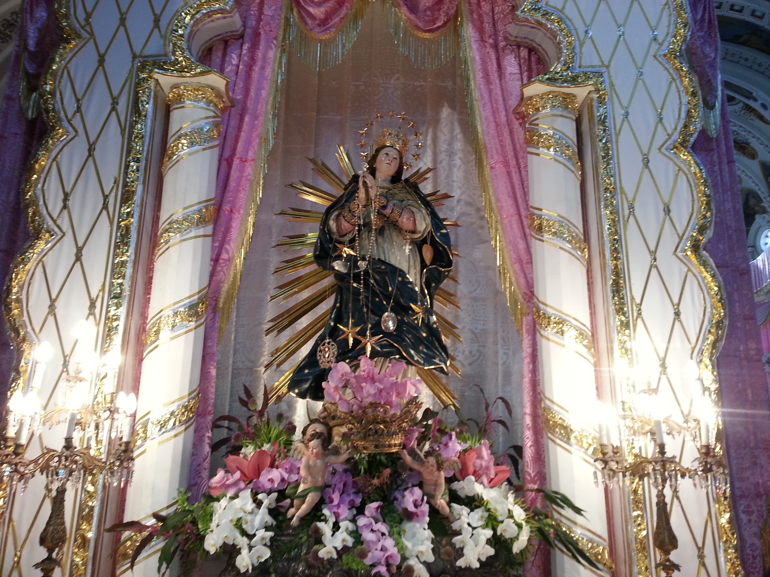 Simulacro dell'Assunta compatrona di Avellino (legno di tiglio cotto nell'olio opera di Nicolò Fumo da Baronissi 1718)